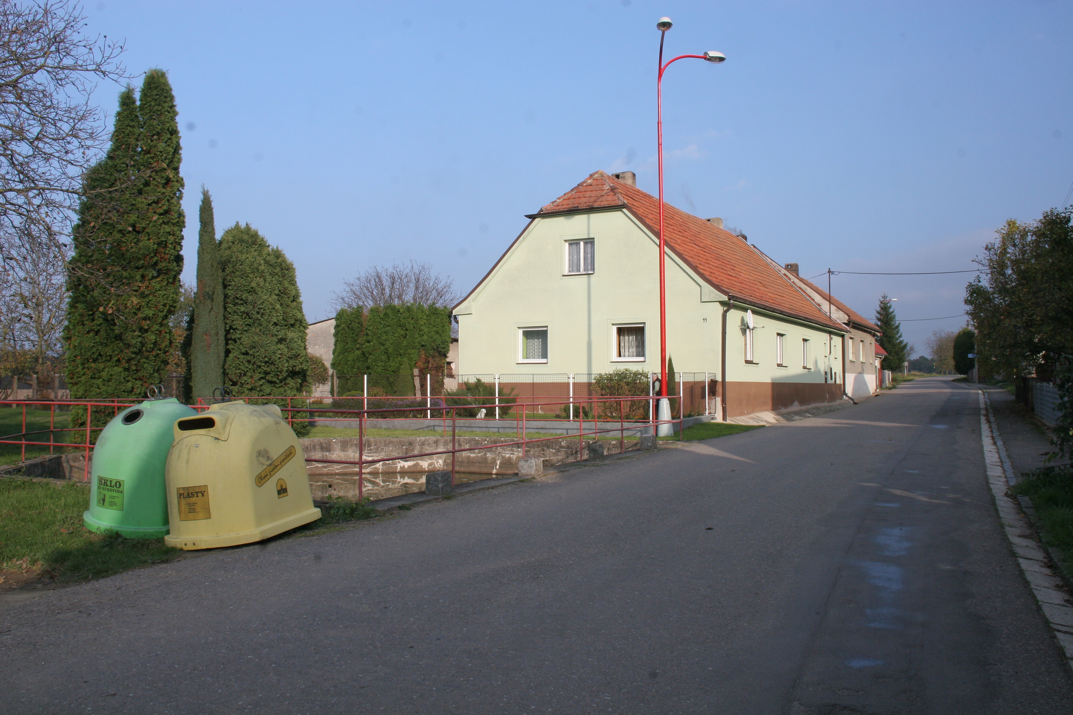 Franclina čp. 11